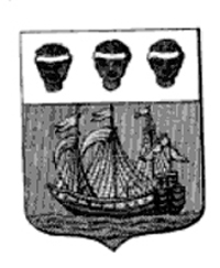 Armes du négociant bordelais Pierre de Kater, portant en chef trois têtes de nègre de sable, bandées d'argent et posées de front